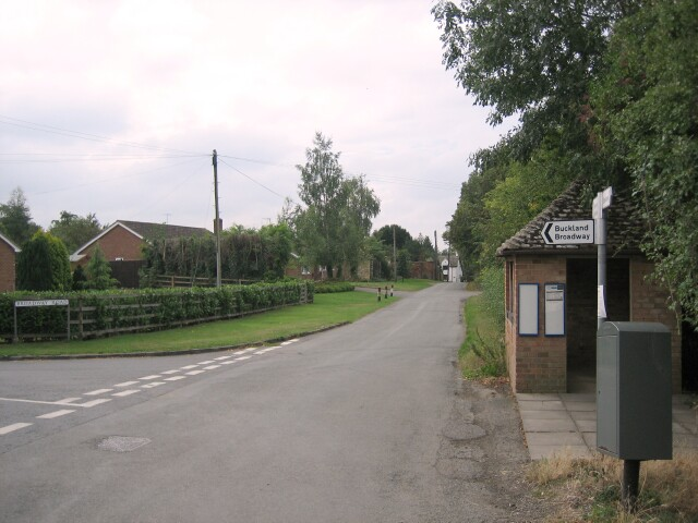 Aston Somerville